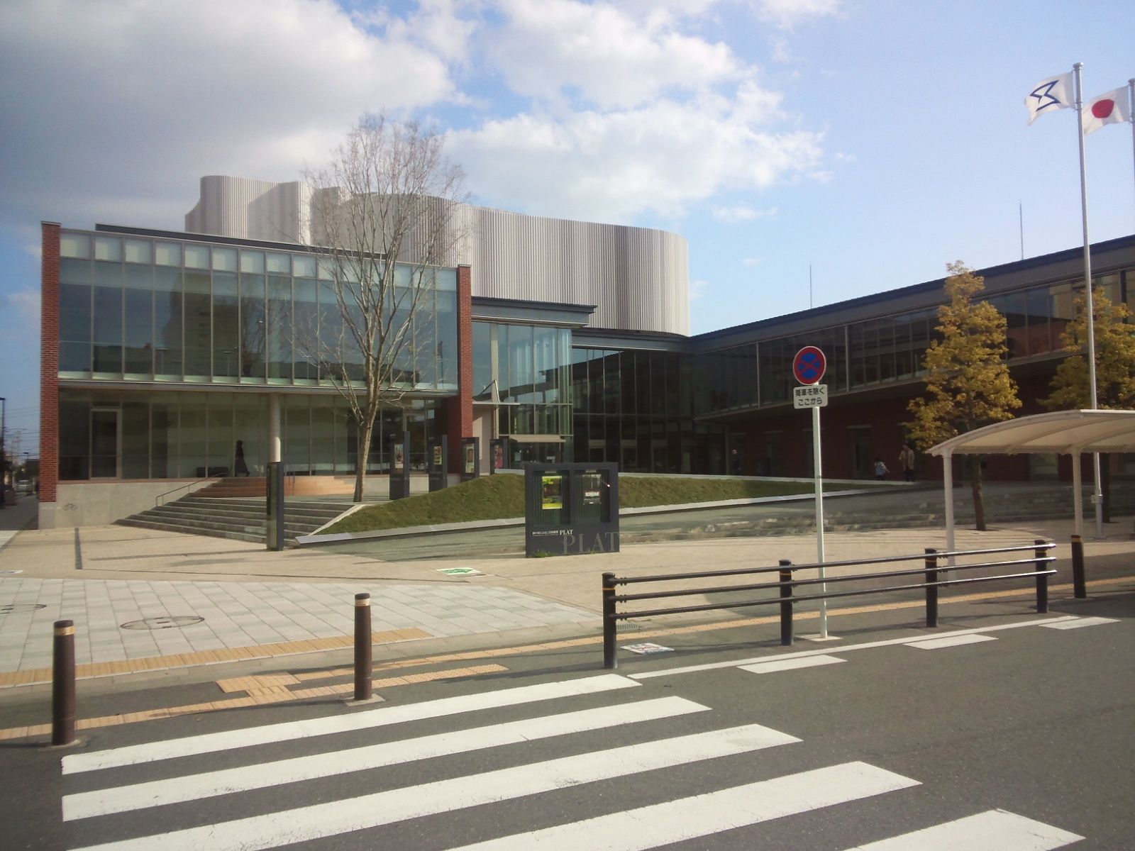 穂の国とよはし芸術劇場PLAT